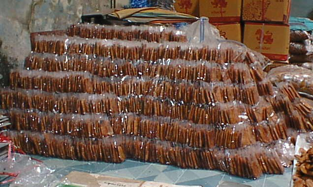 Dried bananas packaged in Ban Bang Krathum, Bang Krathum, Phitsanulok, Thailand